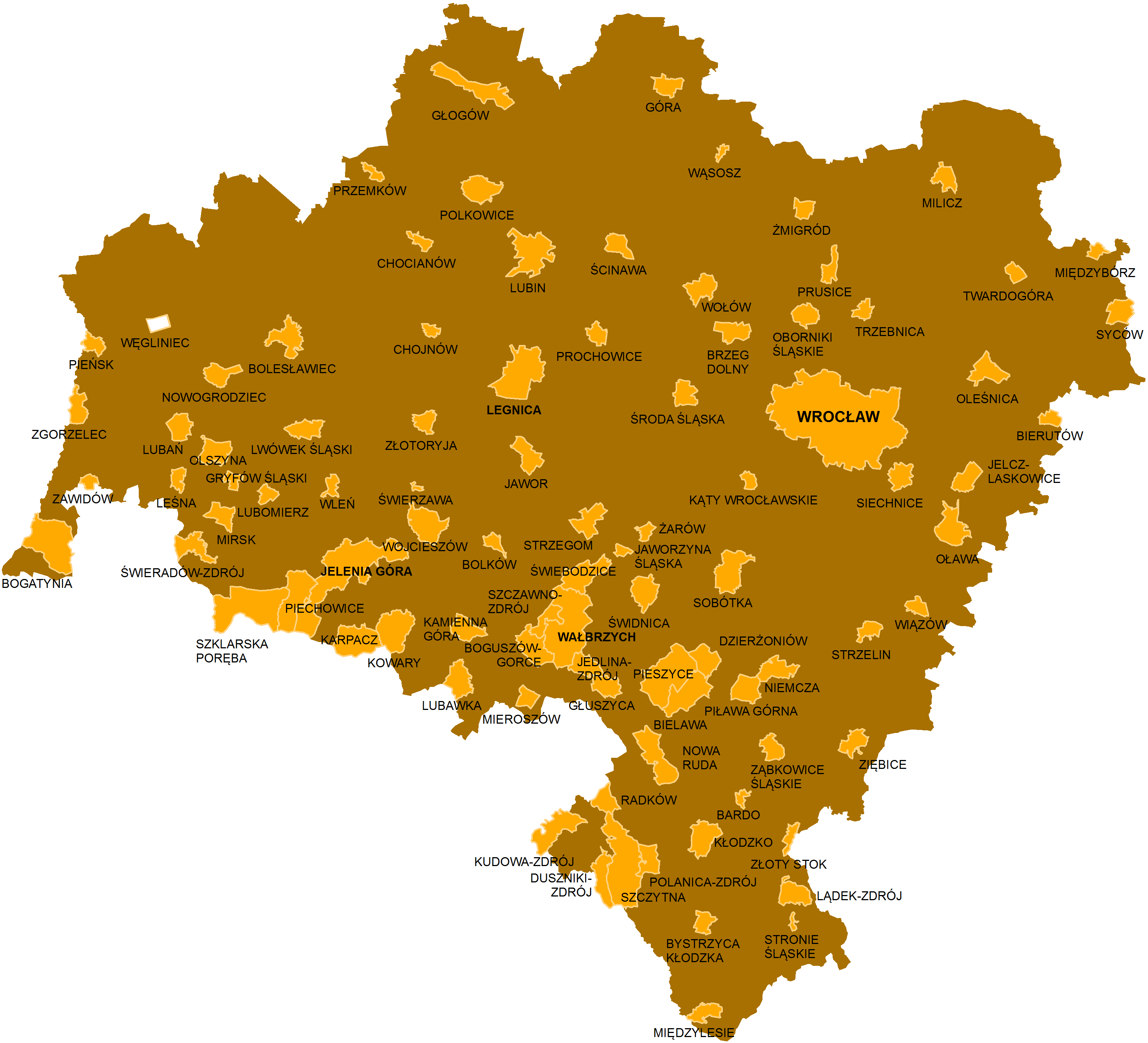 Położenie Węglińca na mapie dolnośląskich miast. Na bazie File:Dolnośląskie-miasta.png